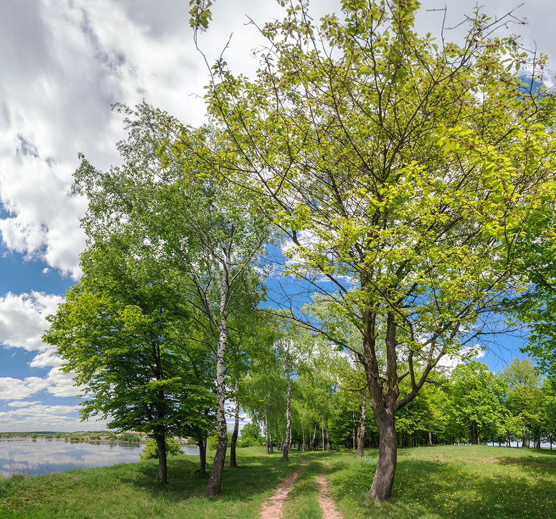 «Межирівські берізки», Жмеринський район, Рівська с/р